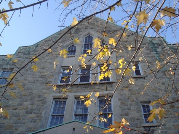 Collède Stanislas de Montréal